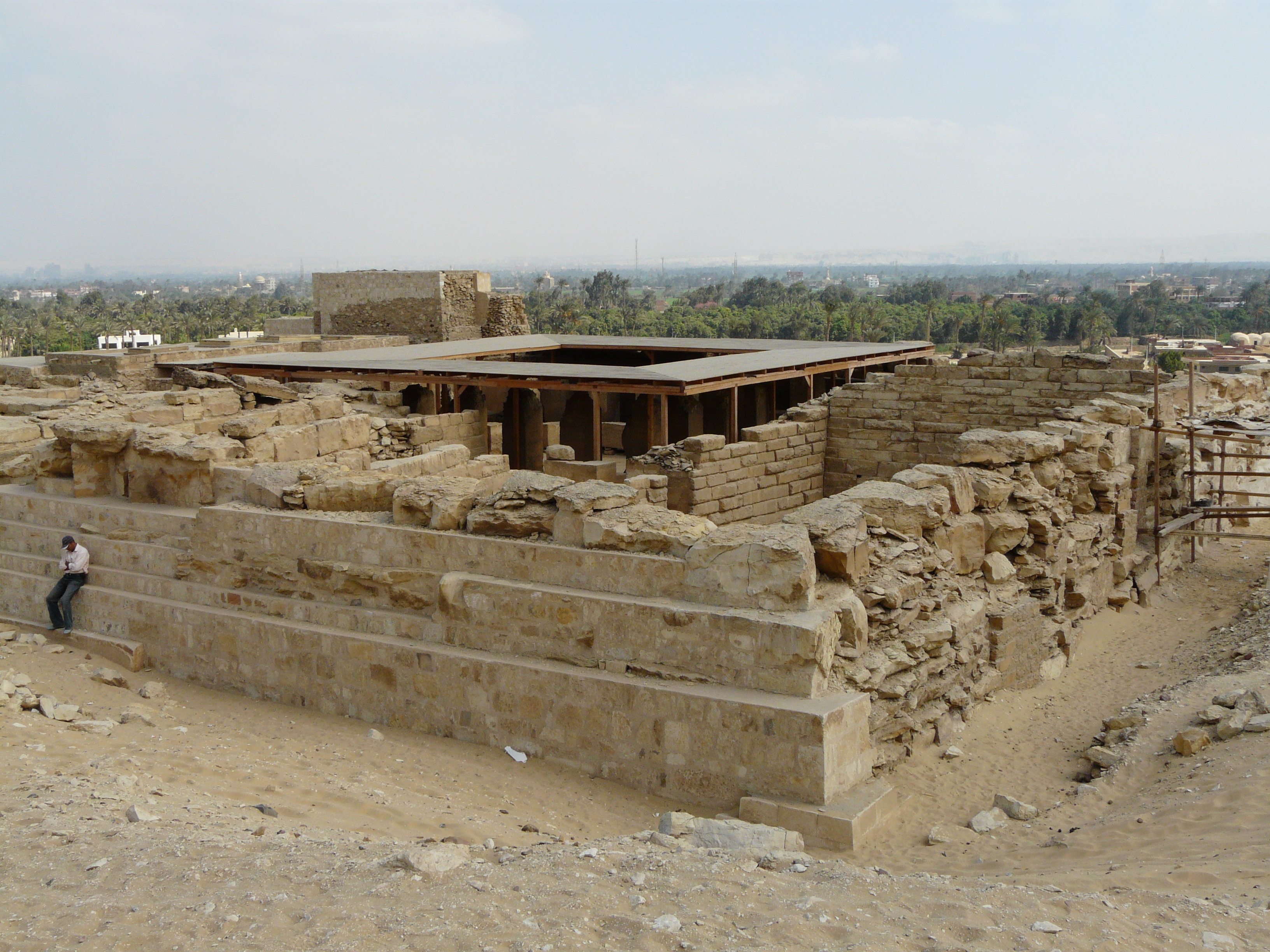 Vue générale du mastaba de Ptahchepsès - Abousir